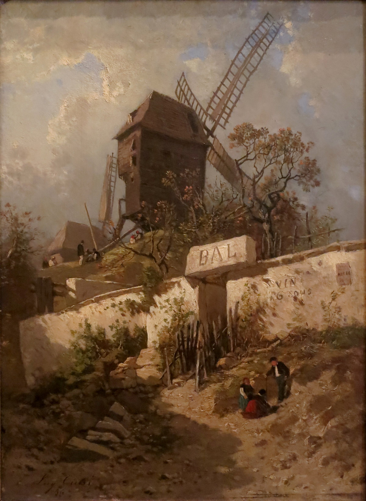 Le moulin de la Galette à Montmartre et, au fond, le moulin Blute-fin (moulin de la Galette démoli en 1925, son nom a été reporté dès 1895 sur le moulin voisin, le Blute-fin)